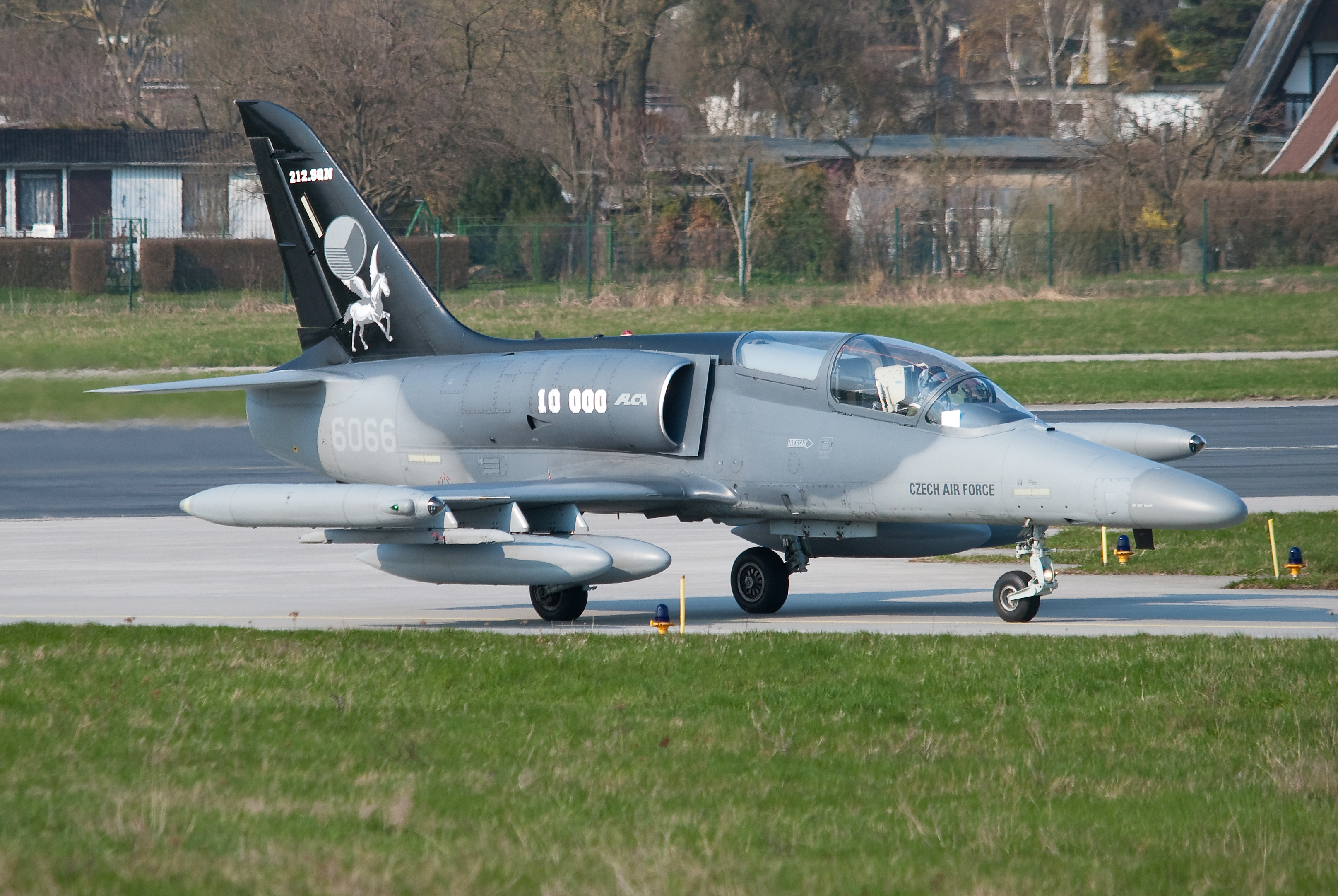 imx00000032